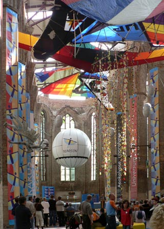 Sonderausstellung in der Nikolaikirche Anklam